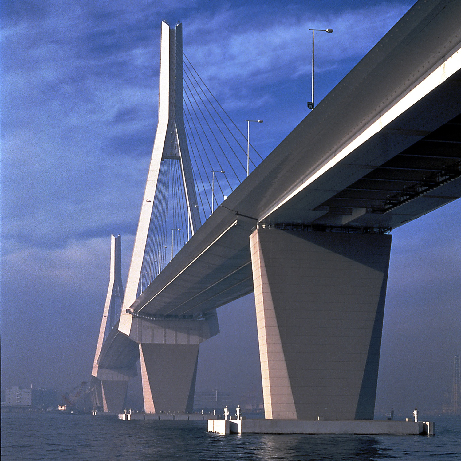 川上元美作品010-1994Unknown works of kawakami motomi 010-1994